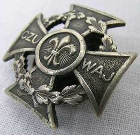 Krzyż Harcerski. Wersja z półwieńcem głogowym, a nie laurowym.